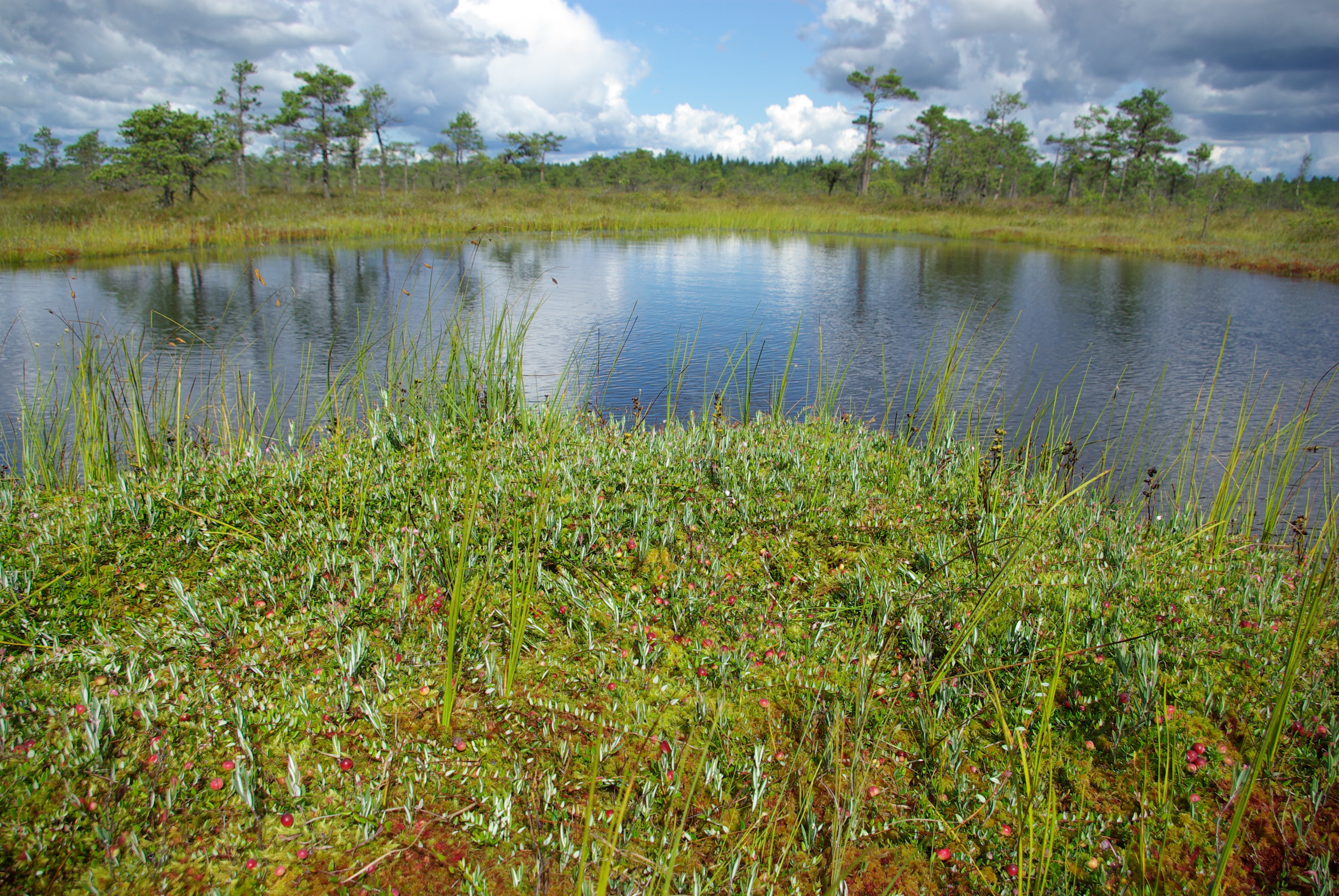 ilus hilissuvine aeg rabas, rahu ja vaikus järvede vahel koos jõhvikatega